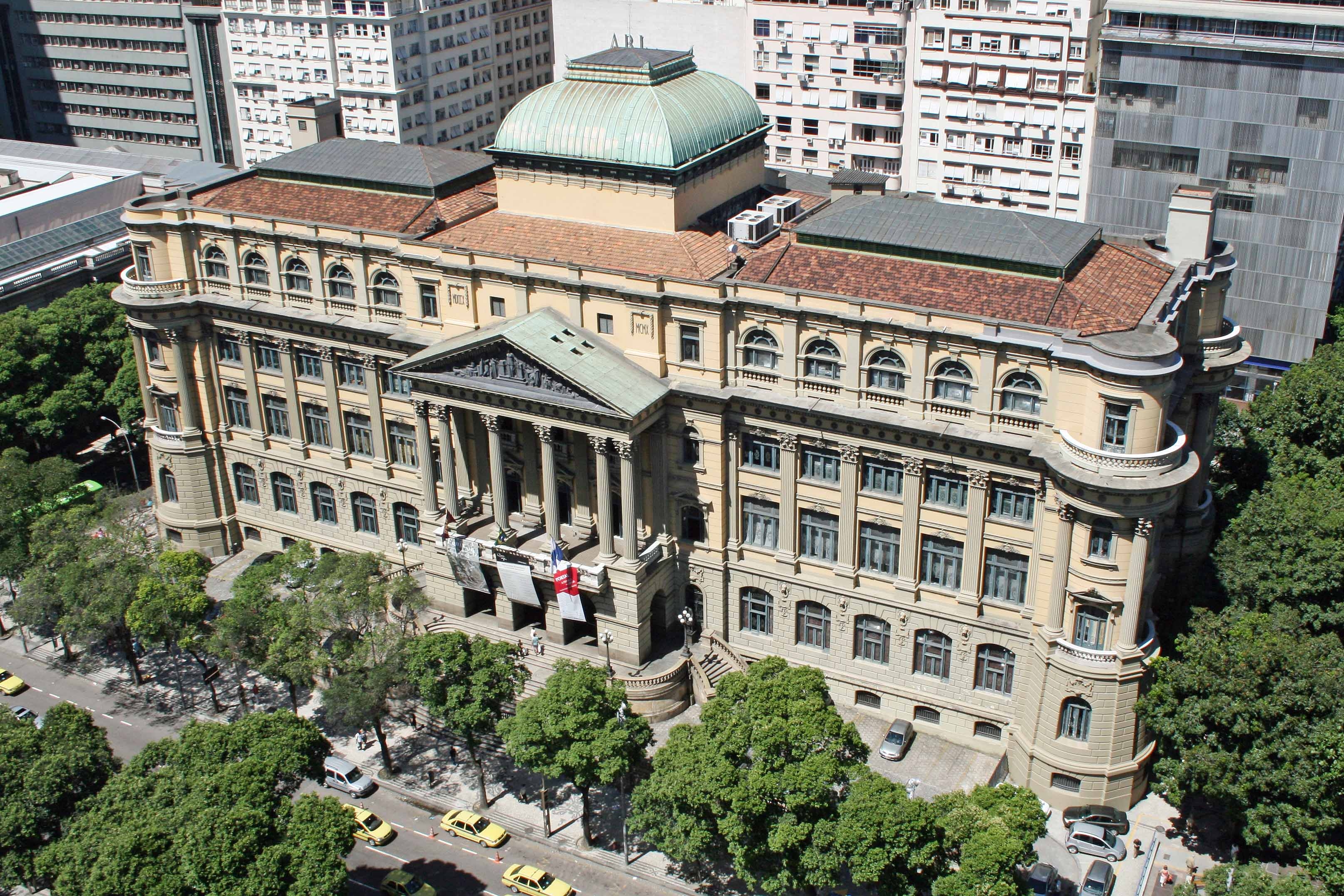 Biblioteca Nacional na Avenida Rio Branco 219, Rio de Janeiro.